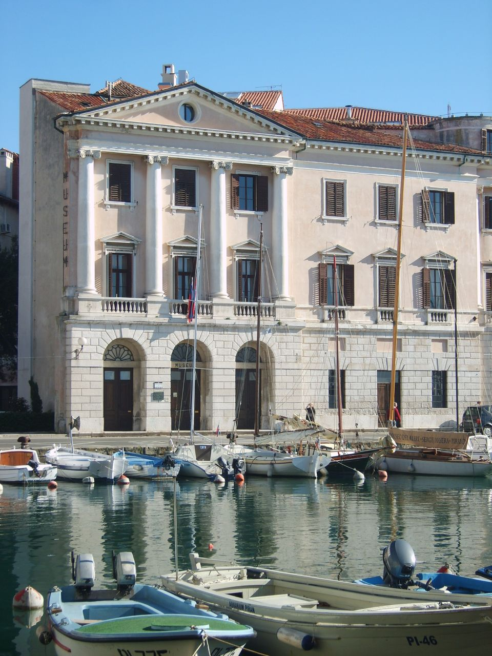 Piran maritime museum.